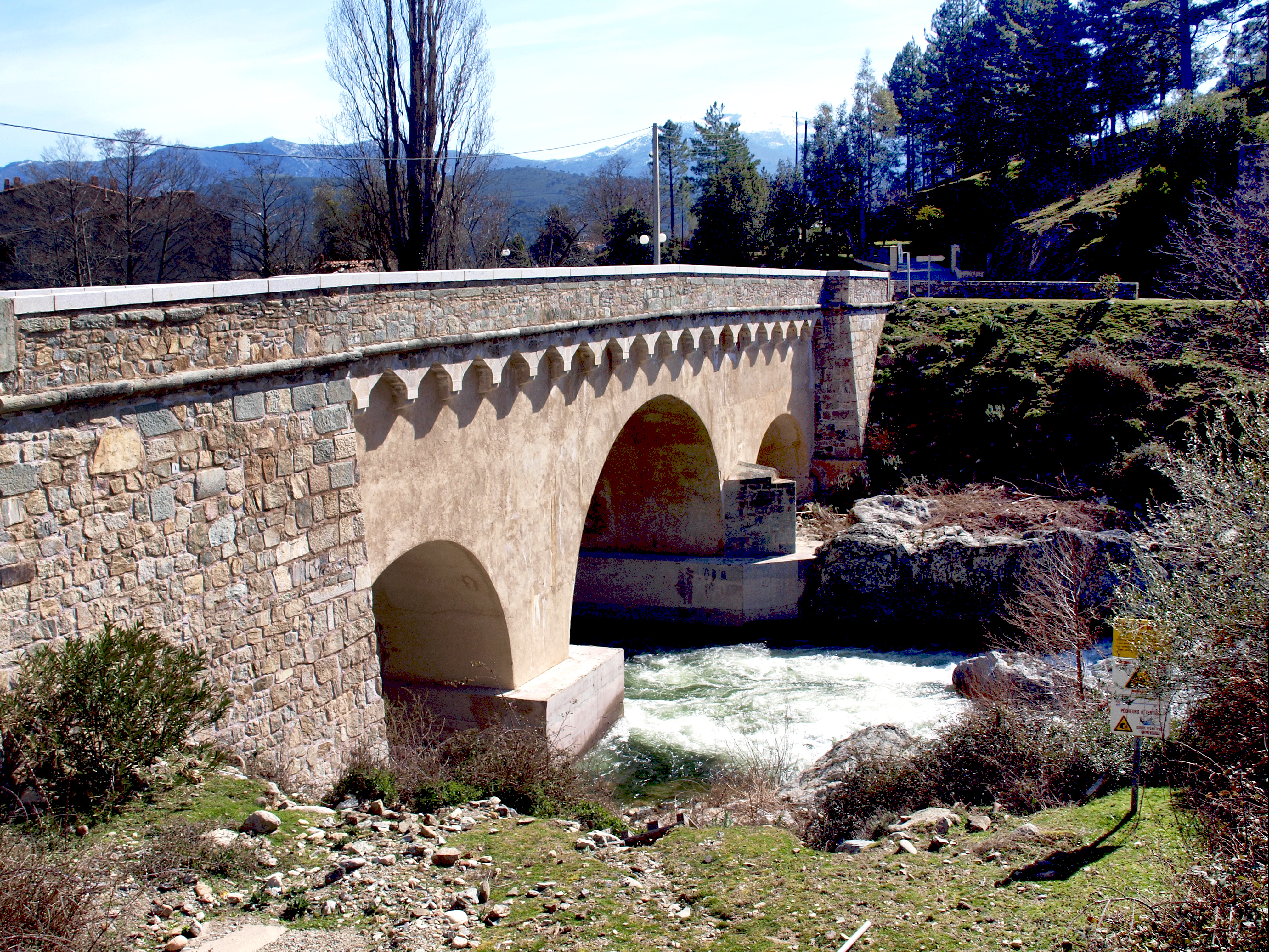 Castirla, Talcini (Haute-Corse) - Pont génois de Ponte Castirla (U Ponte à Castirla) dit "Pont du Diable"